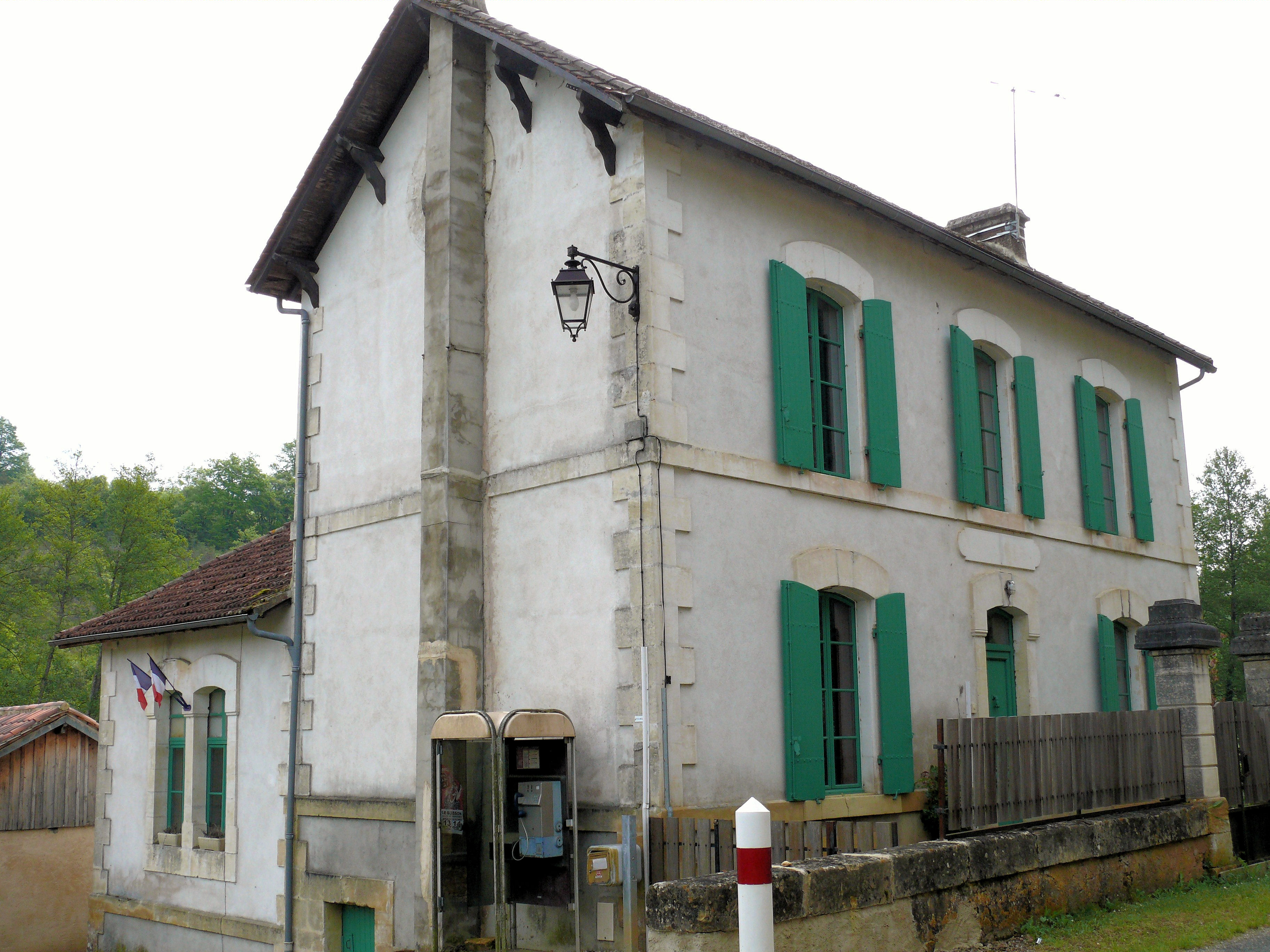 Saint-Avit-Rivière - Mairie